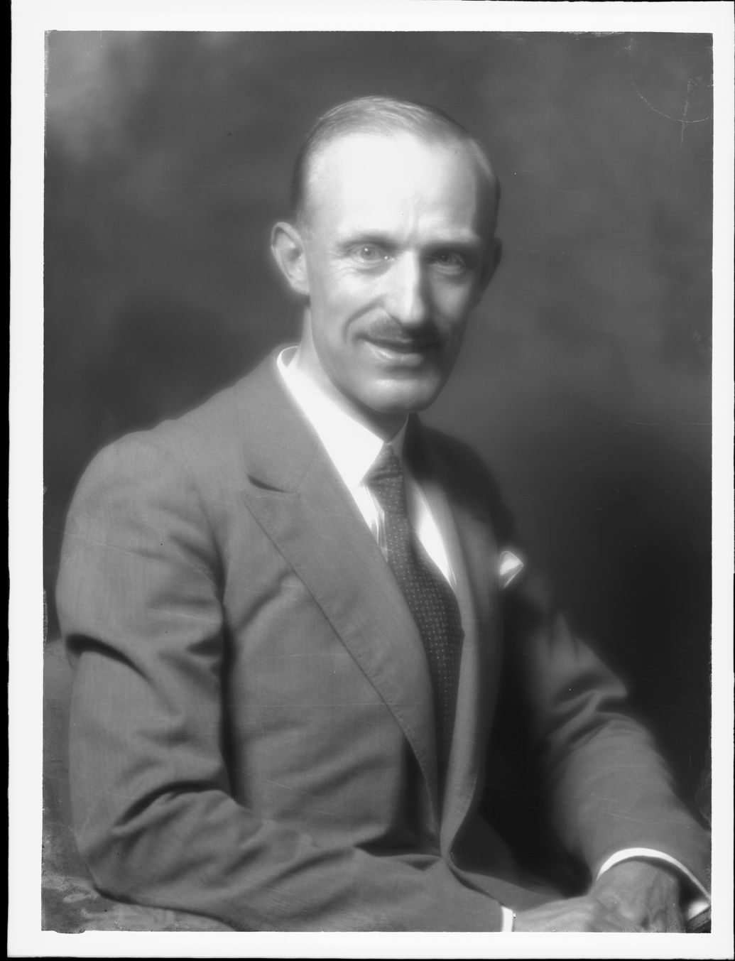 Emilio Sommariva (1883 - 1956) Ritratto dell'architetto Alberto Alpago Novello (1889-1985)